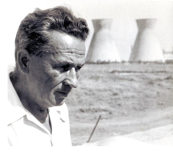 אבא חושי- דיוקן. מתוך: הארכיון ע"ש אבא חושי, ספריית יונס וסוראיה נזריאן, אוניברסיטת חיפה.